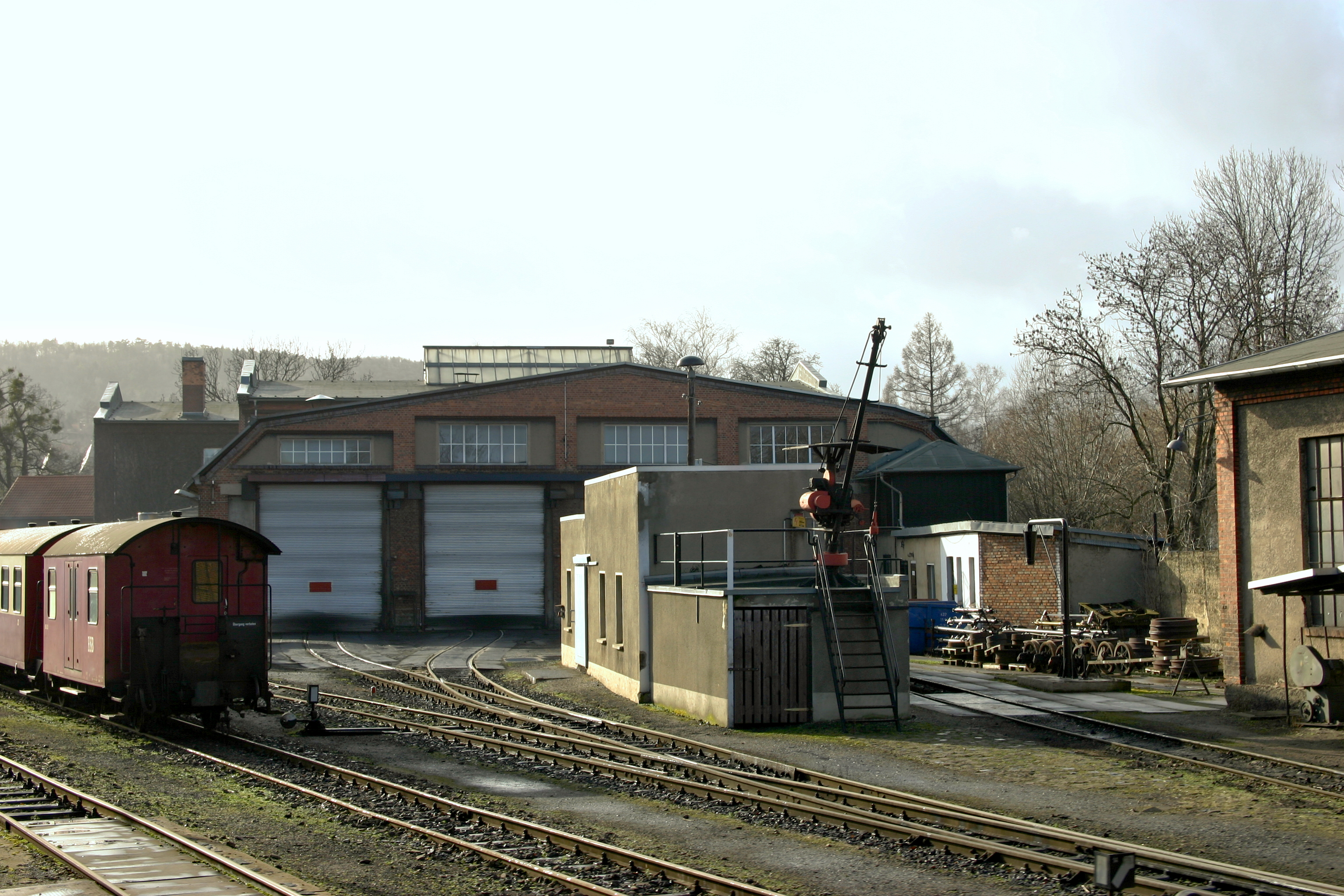 Bw Wernigerode Westerntor der HSB am 02.Februar 2012